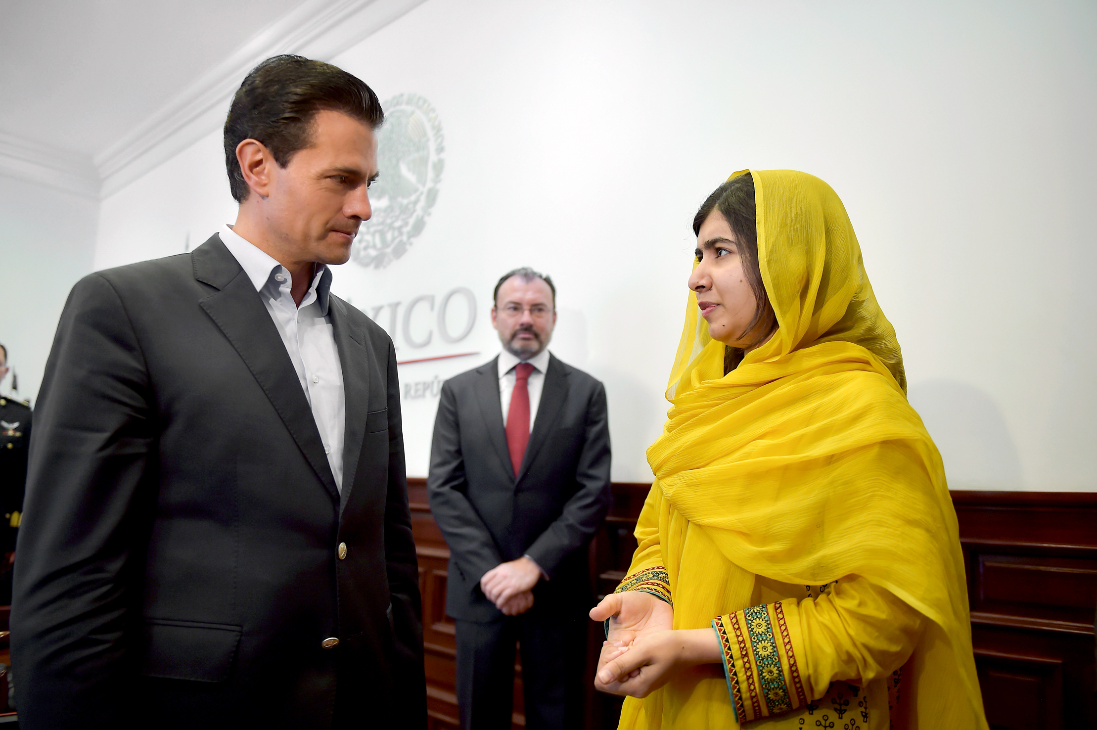 Malala Yousafzai and 57th President of Mexico Enrique Peña Nieto.